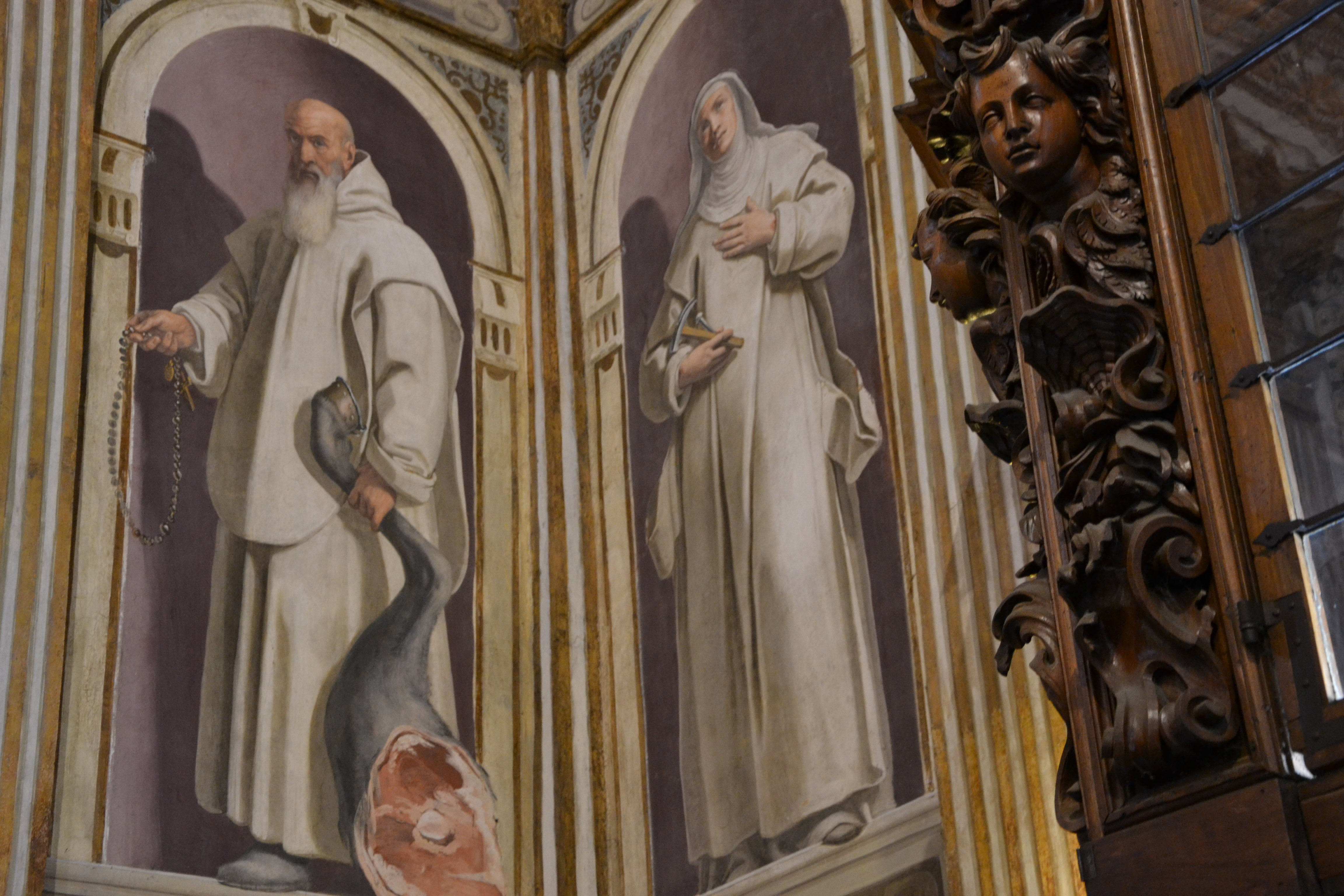 Affeschi di Daniele Crespi, 1629, Milano, Certosa di Garegnano